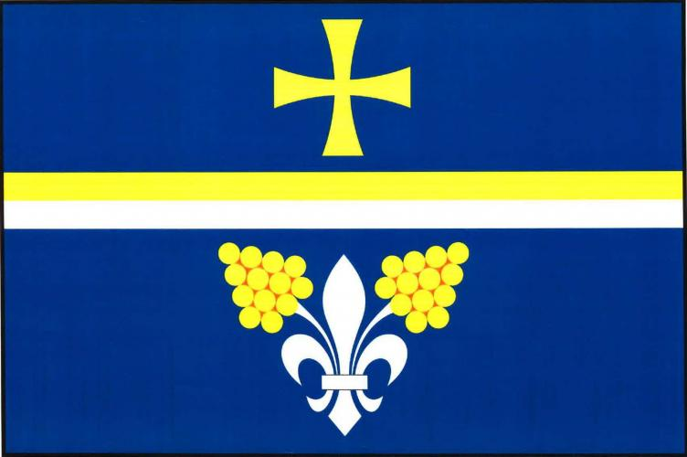 vlajka, Popovice, okres Uherské Hradiště